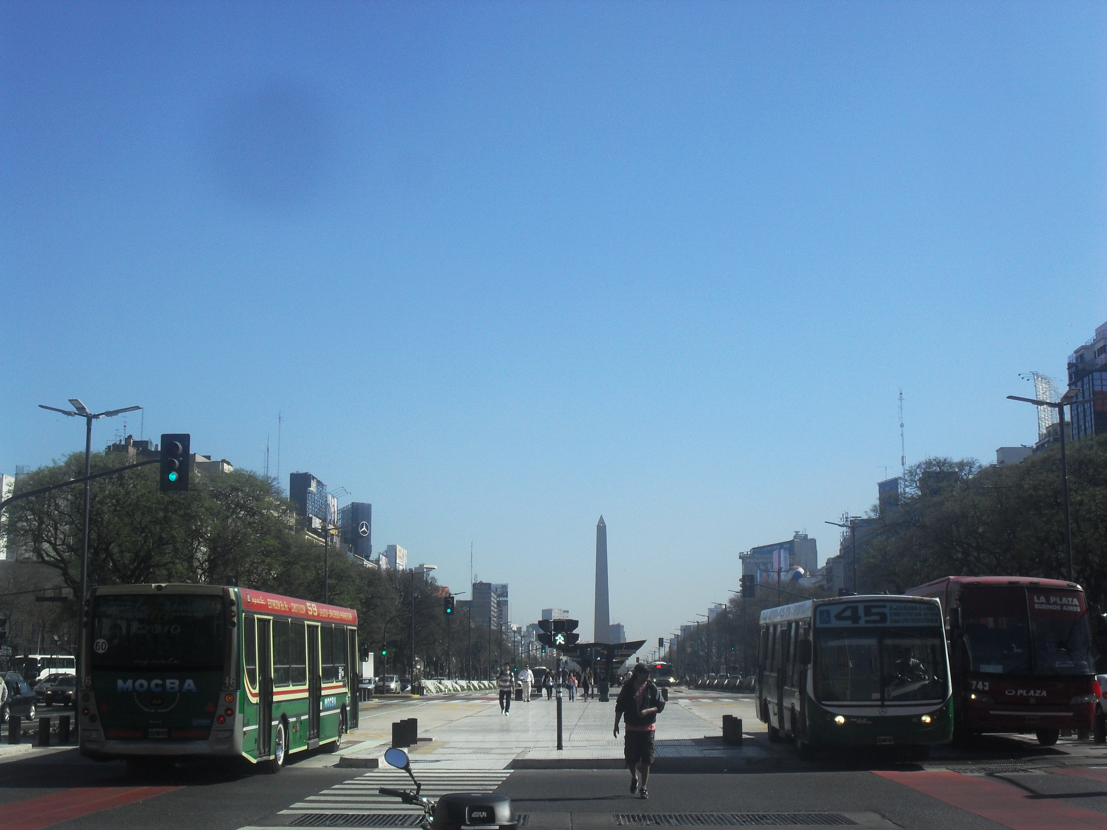 Vista hacia el Norte de la avenida 9 de Julio con el nuevo sistema de Metrobús.